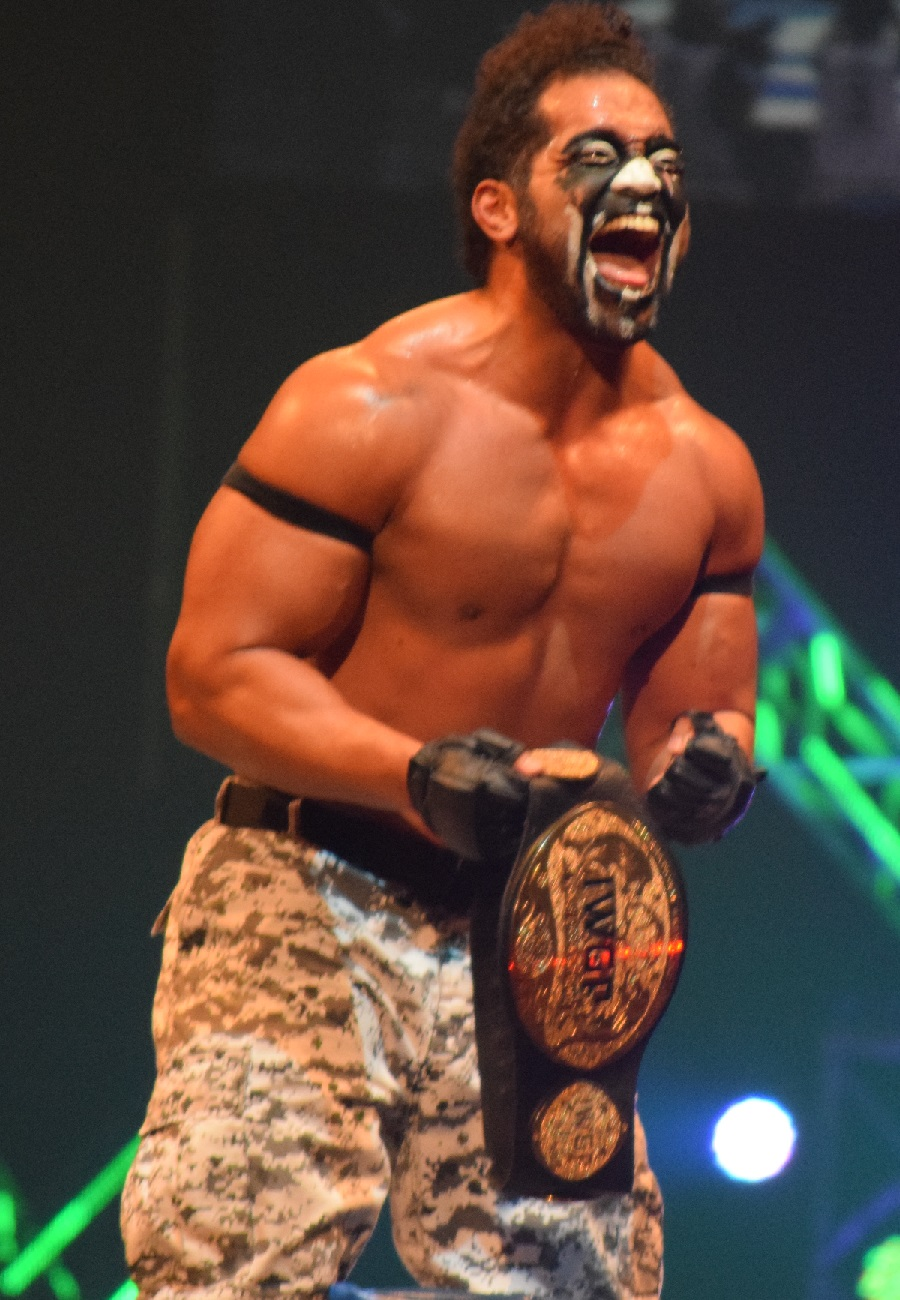 2016年11月5日 大阪府立体育会館「POWER STRUGGLE」 タンガ・ロア